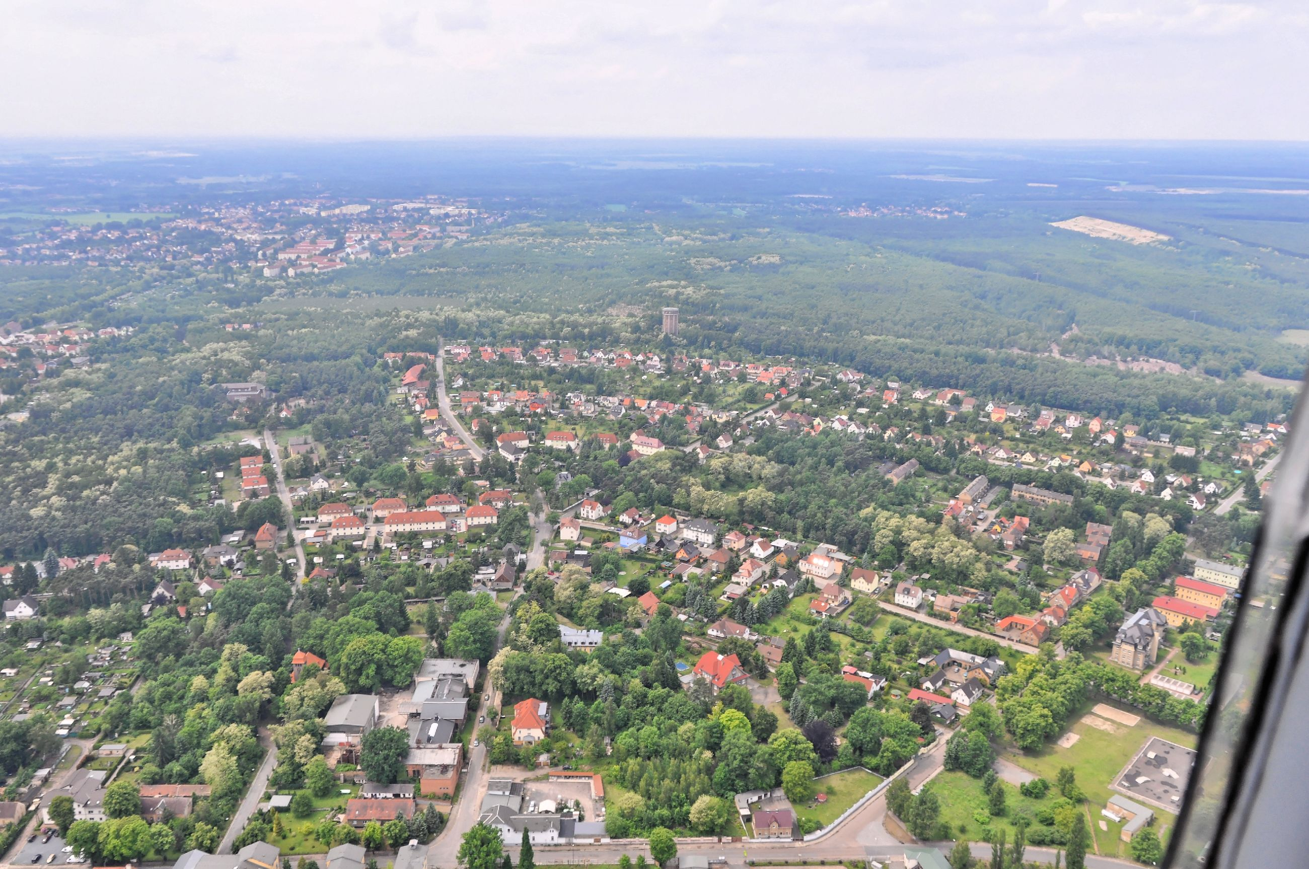 Luftbild von Lauchhammer; Überführungsflug vom Flugplatz Schwarzheide-Schipkau über Potsdam, Lüneburg zum Flugplatz Nordholz-Spieka